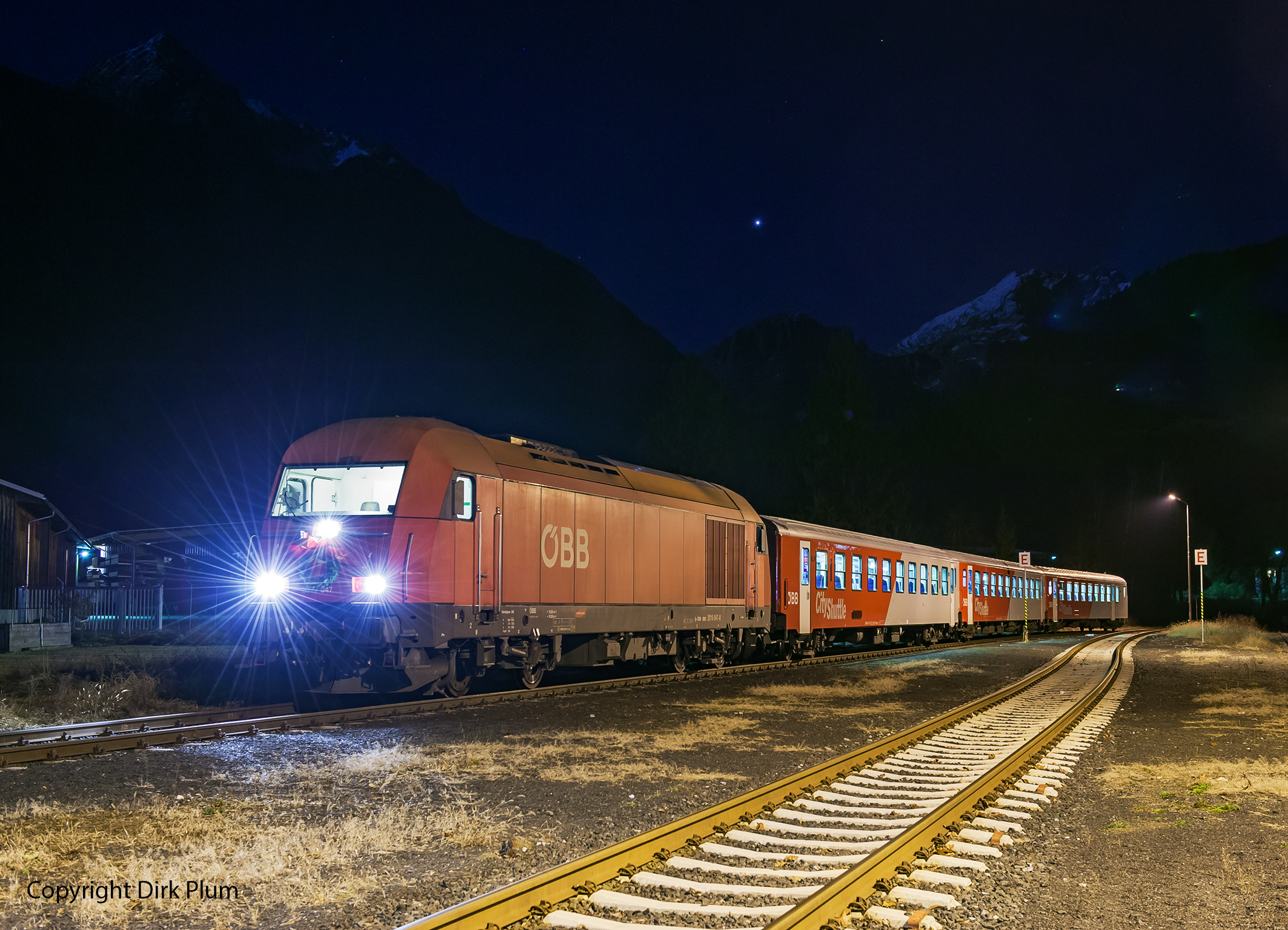 Am 10.12.2016 der letzte Zug ,it planmäßiger Personenbeförderung von Kötschach-Mauthen nach Hermagor. Mit einen langen Pfiff und der örtlichen Kapelle wurde er verabschiedet. Wieder verschwindet eine Eisenbahnstrecke!